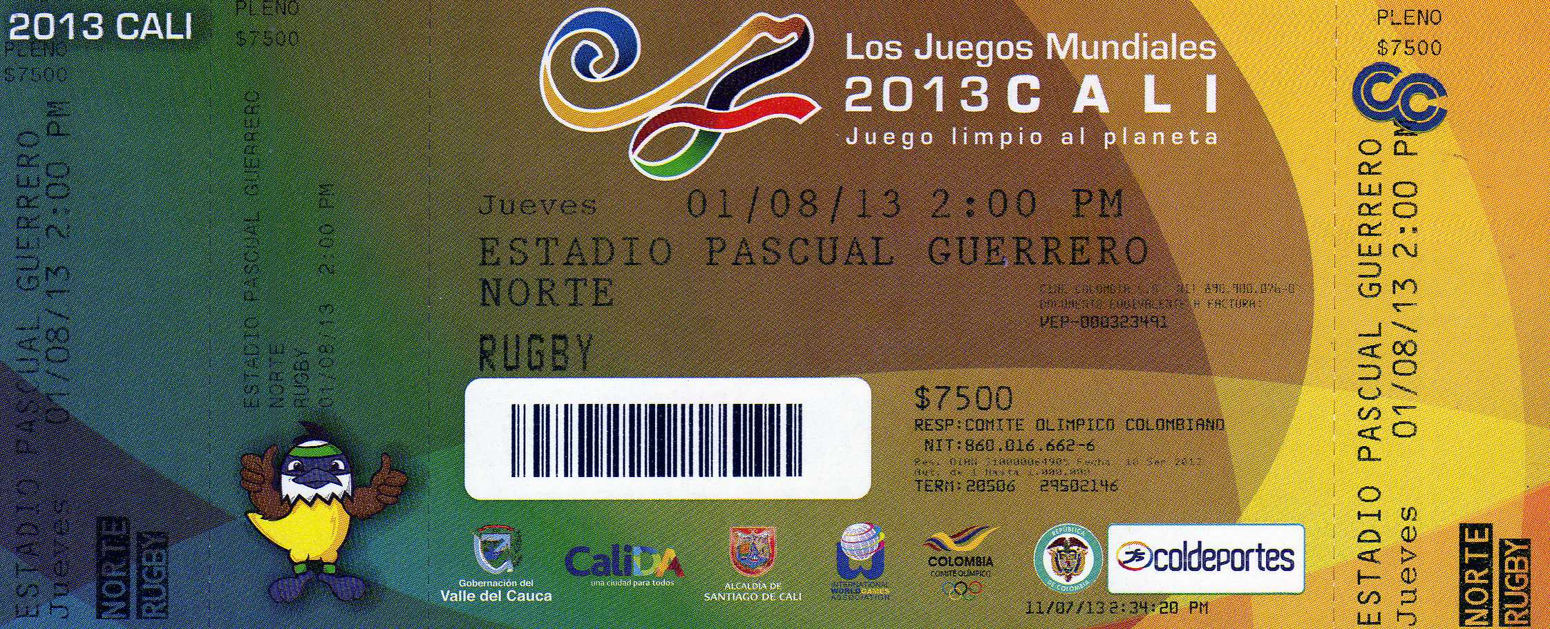 Boleta para el ingreso a la primera jornada de Rugby 7 de los Juegos Mundiales 2013.